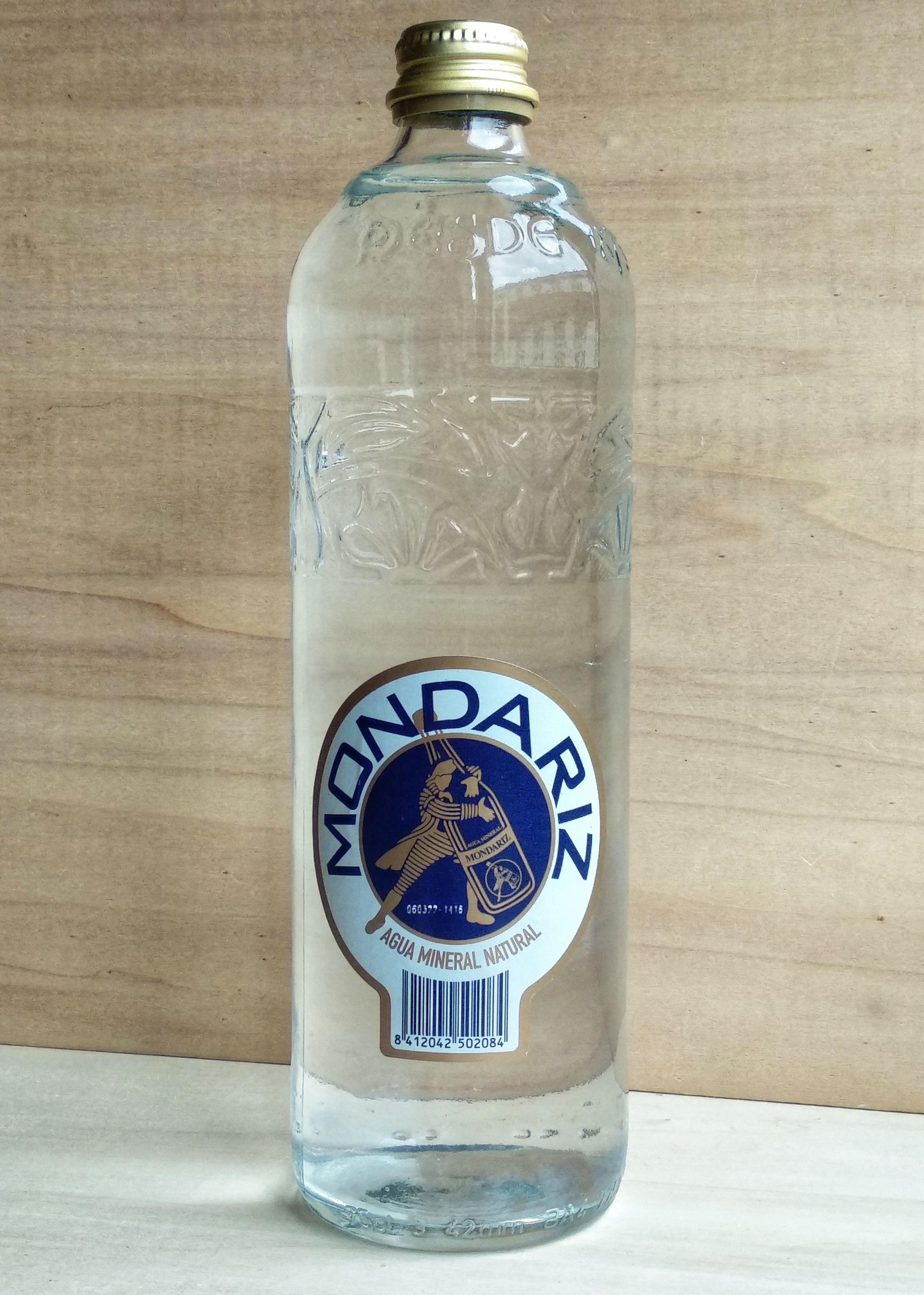 Botella de agua mineral natural de la marca gallega Aguas de Mondariz. La imagen recursiva del agüista abrazado a la botella aparece como logotipo de la marca en 1929.